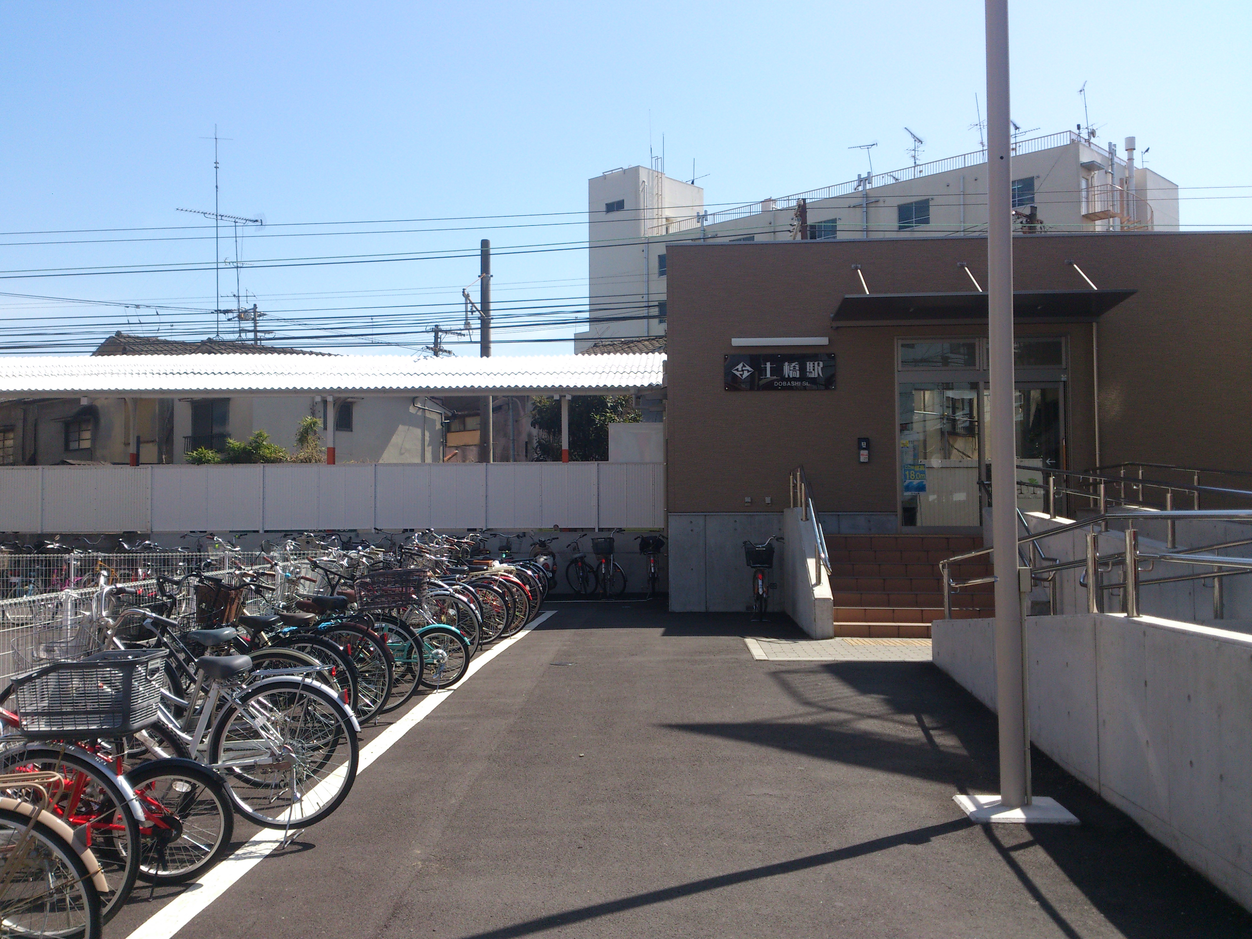 伊予鉄道 土橋駅です。